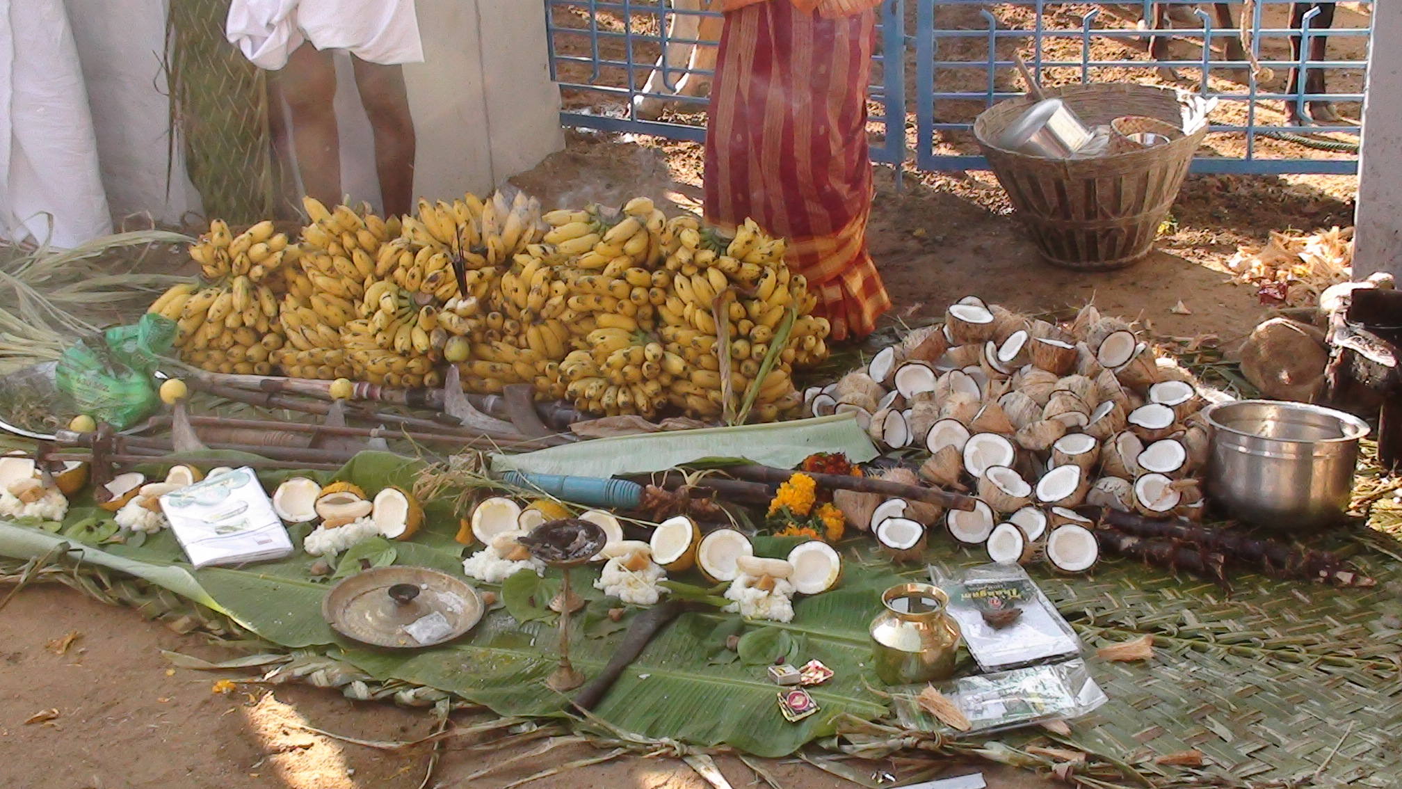 குலப்படையல்